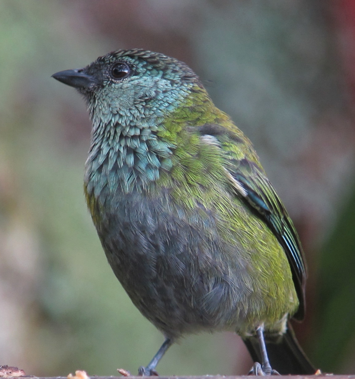 Rionegro, Antioquia, Colombia